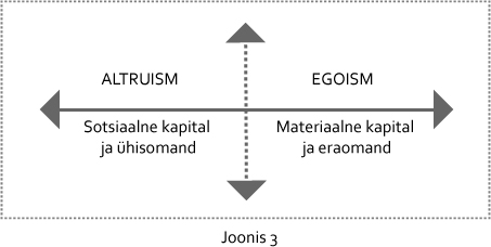 Antud joonis kirjeldab võrdsuse telge mitmedimensioonilises ühiskonnakäsitluses.